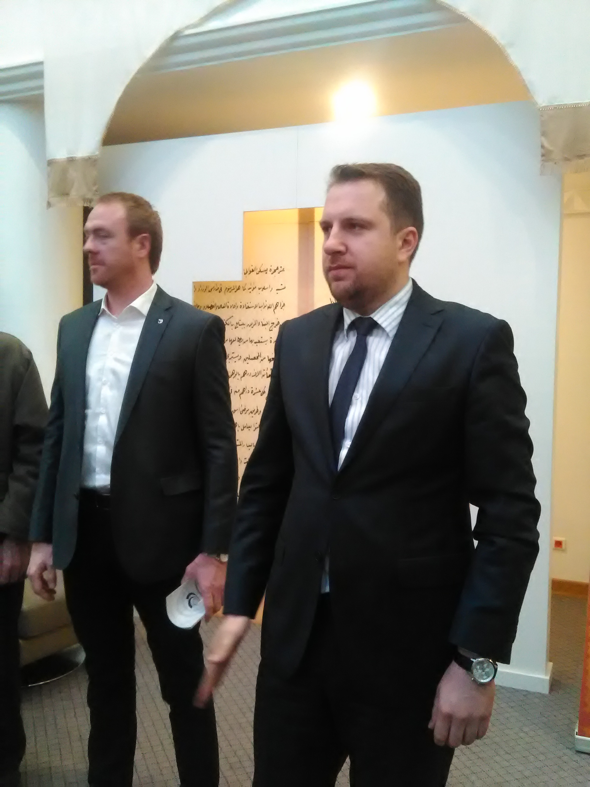 Gradonačelnik Sarajeva, Abdulah Skaka